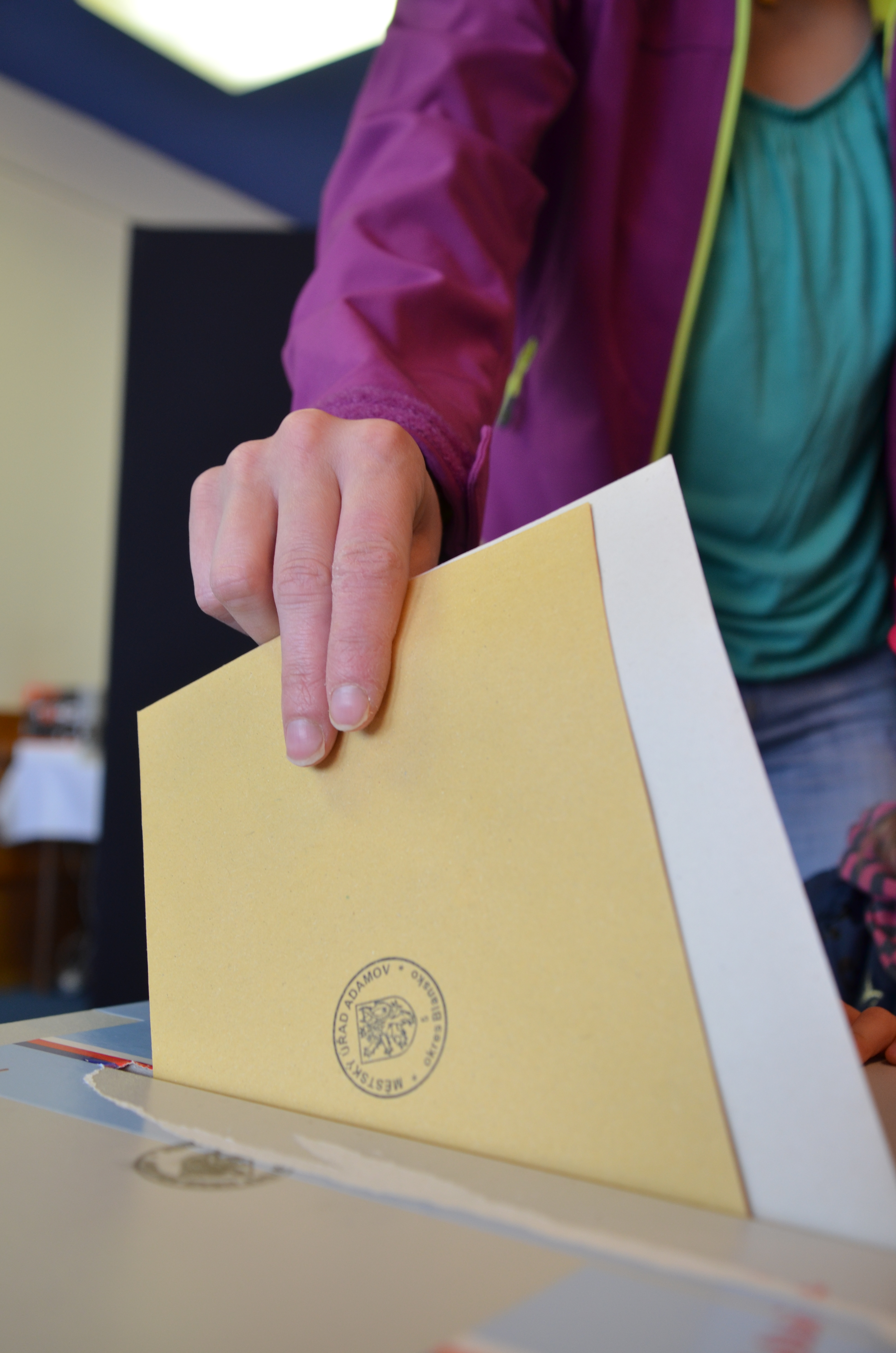 Vhození hlasovacích lístků v obálkách do volební urny při volbých do Senátu ČR a zastupitelstev krajů v roce 2016